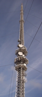 Emetteur de Bouvigny-Boyeffles